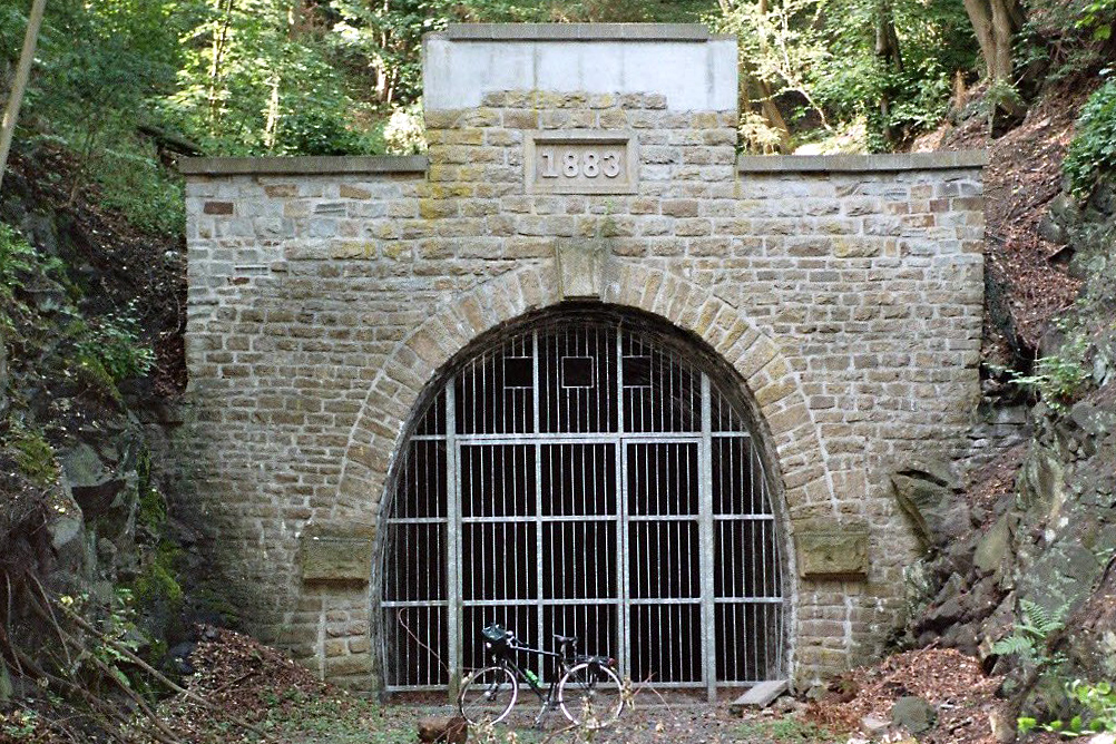 Südportal des Schulenbergtunnels in Hattingen, Deutschland